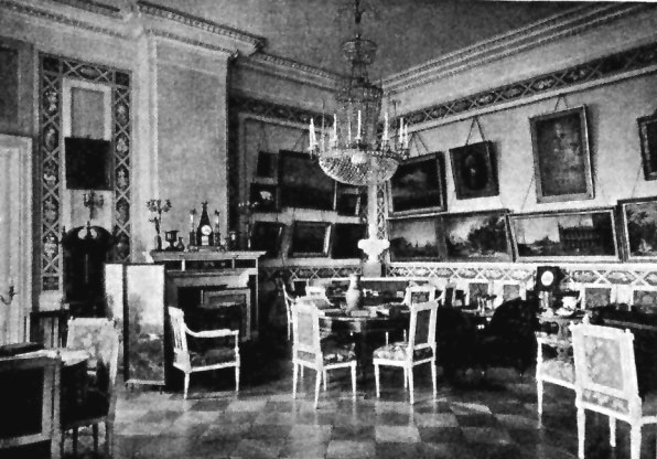 Красная гостиная в усадьбе Петровское The parlor of Prince Galitzine at Petrovskoye Hall